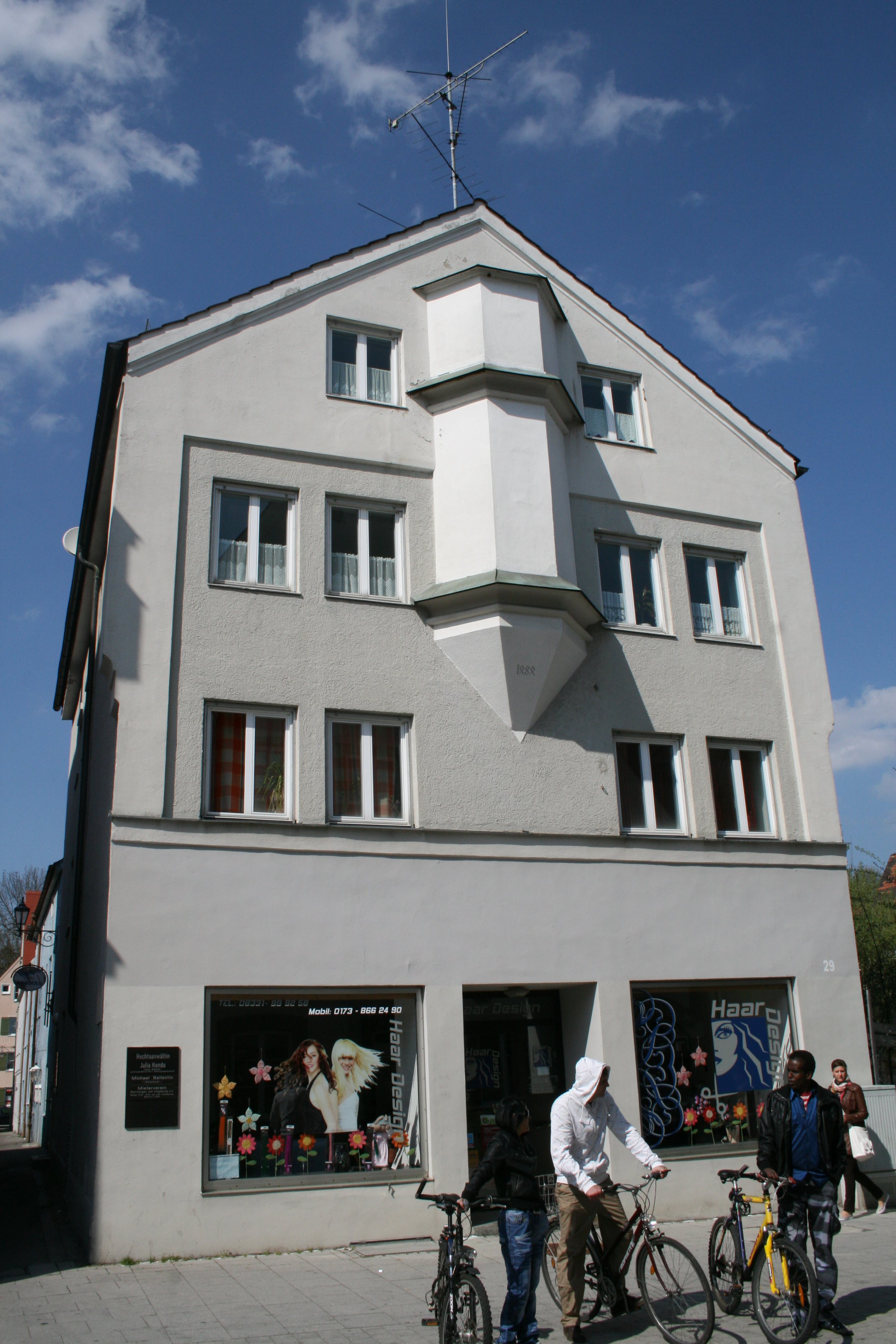 Hausfassade in der Kalchstraße im oberschwäbischen Memmingen